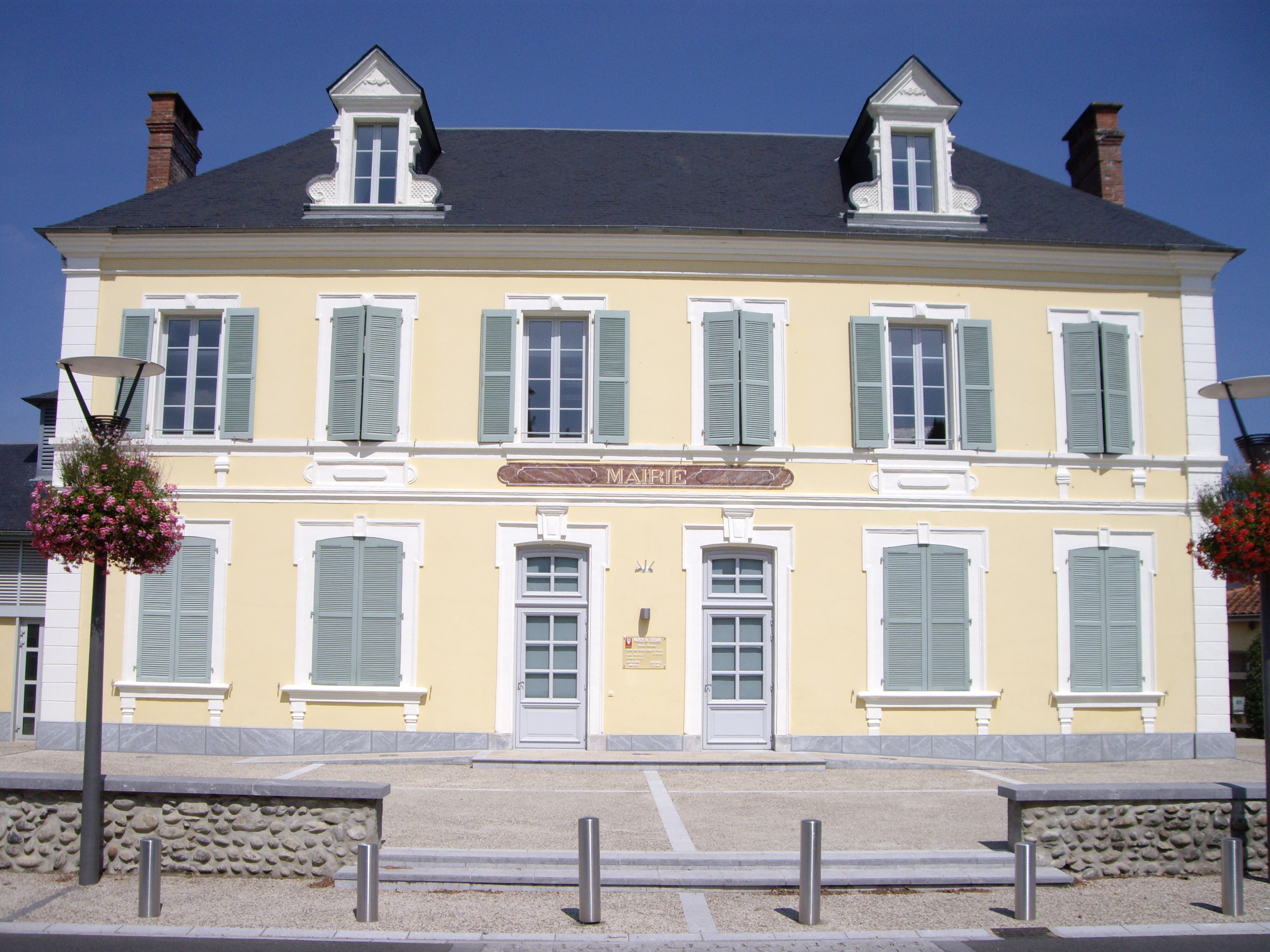 Mairie de Juillan (65)